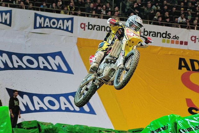 ADAC-Supercross 2010 Dortmund - by Akisutra Projekt - Eventfotografie